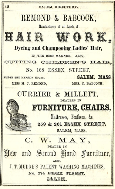 Advertisements, Salem, Massachusetts